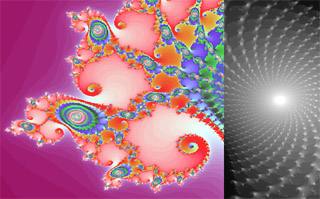 Detaljbild från fraktalen mandelbrotmängden.